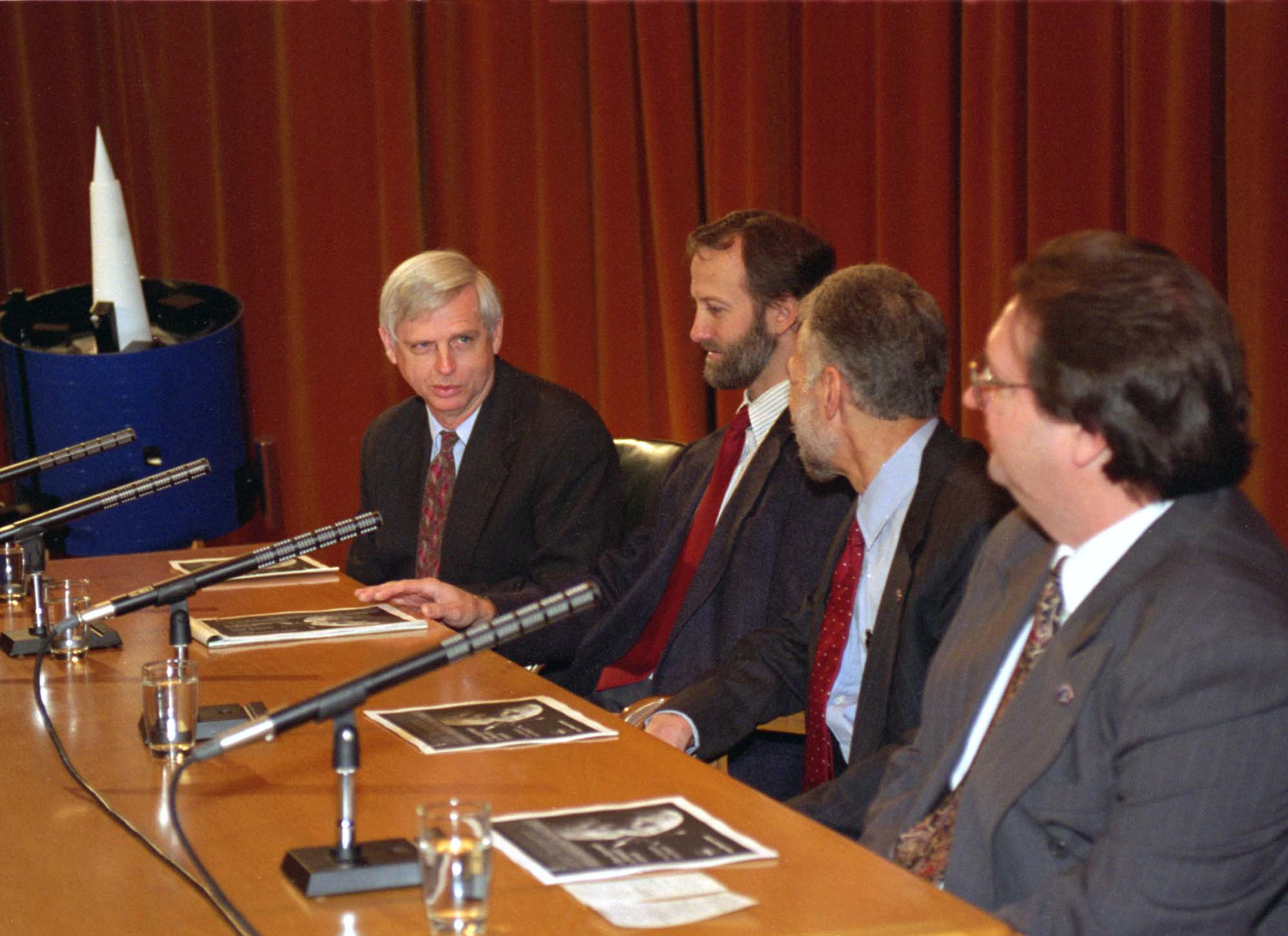 Информационный брифинг лунного исследователя, 5 марта 1998 года, в исследовательском центре НАМС в Эймсе, Моффетт Филд, Калифорния.